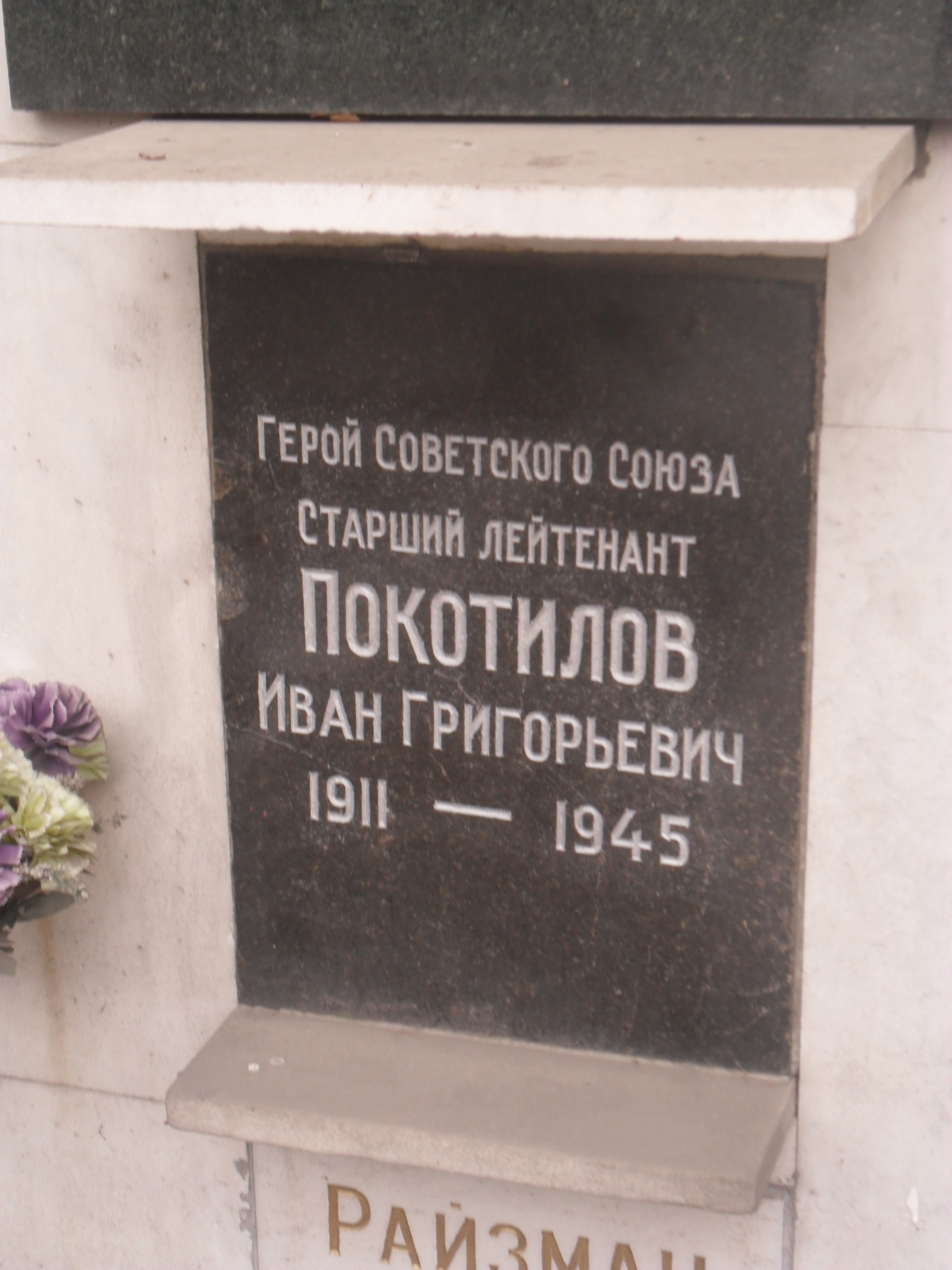 Плита колумбария Героя Советского Союза Ивана Покатилова на Новодевичьем кладбище Москвы.